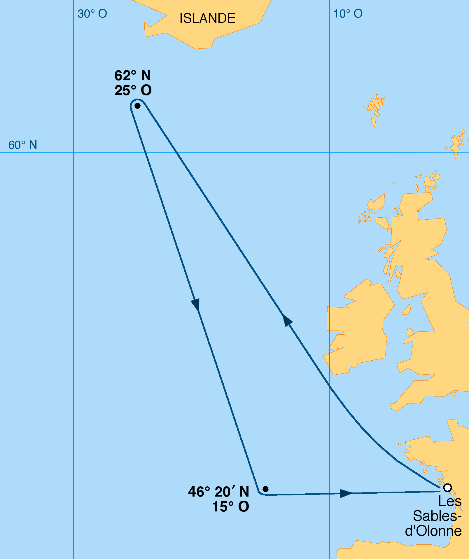 Parcours théorique de la course à la voile Vendée-Arctique-Les Sables-d'Olonne, réservée aux Imoca, créée en juillet 2020 pour remplacer la New York-Vendée-Les Sables-d'Olonne (annulée pour cause de pandémie de covid-19). Le sens du parcours est déterminé en fonction des prévisions météo. Basé sur une carte de 1895 d'Anatole Châtelain. Fichier Planisphère_Châtelain_1895.jpg. Source : Bibliothèque nationale de France.